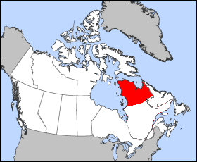 Territoire approximatif du Nunavik, Québec, Canada. Modification de l'image "